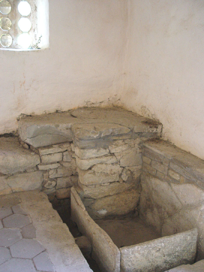 Купель для крещения. Северный Зеленчукский храм (Х в.) - Георгиевский кафедральный собор Аланской Епархии. Нижне-Архызский историко-архитектурный и археологический комплекс. Карачаево-Черкессия. Музей-заповедник. Снимок сделан внутри.